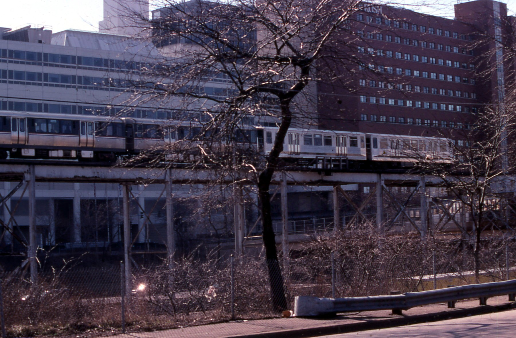 19980223 26 CTA Blue Line L near Paulina St.